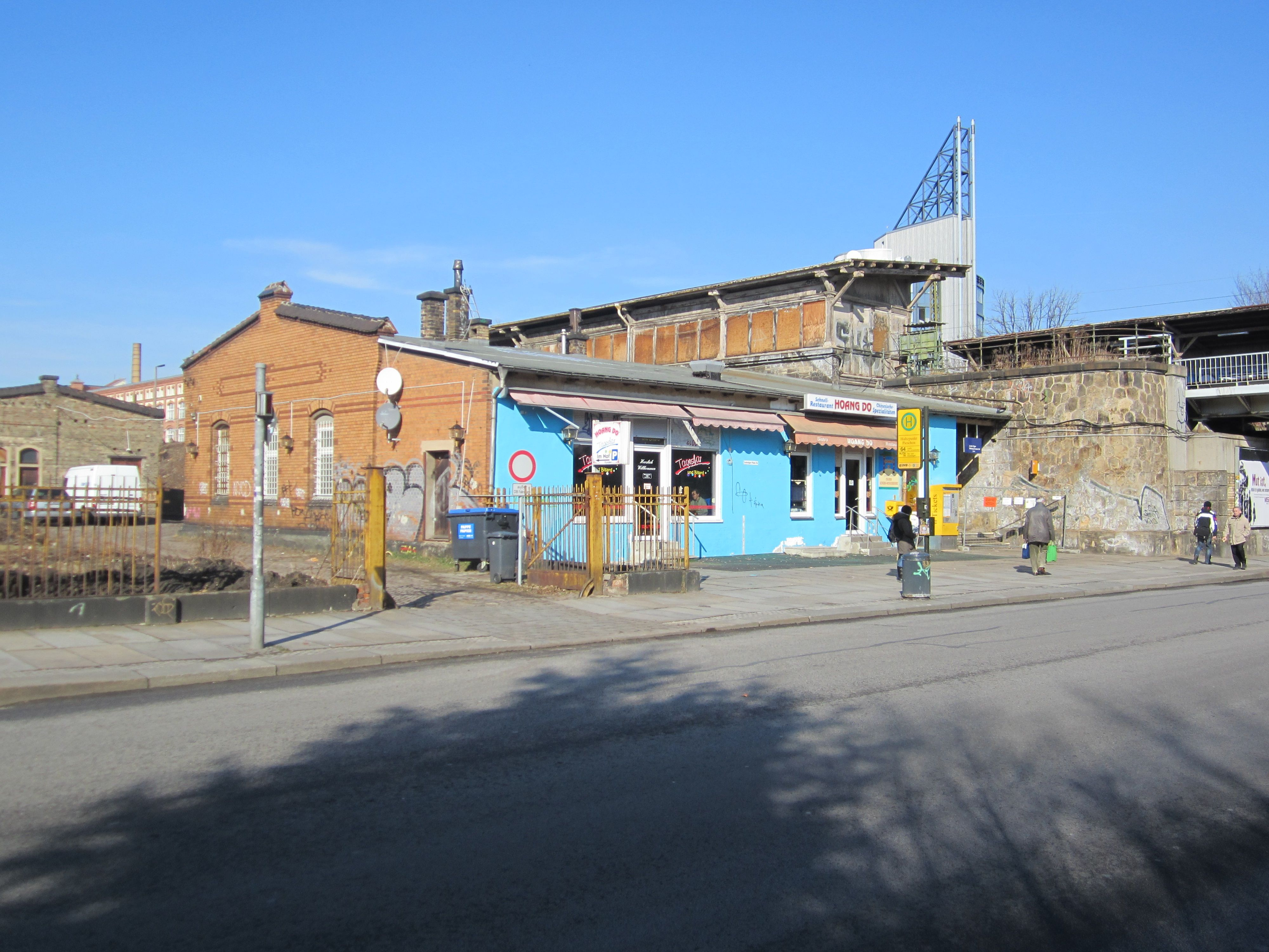 Zugang zum Bahnsteig und Gastronomie am Hp. Pieschen